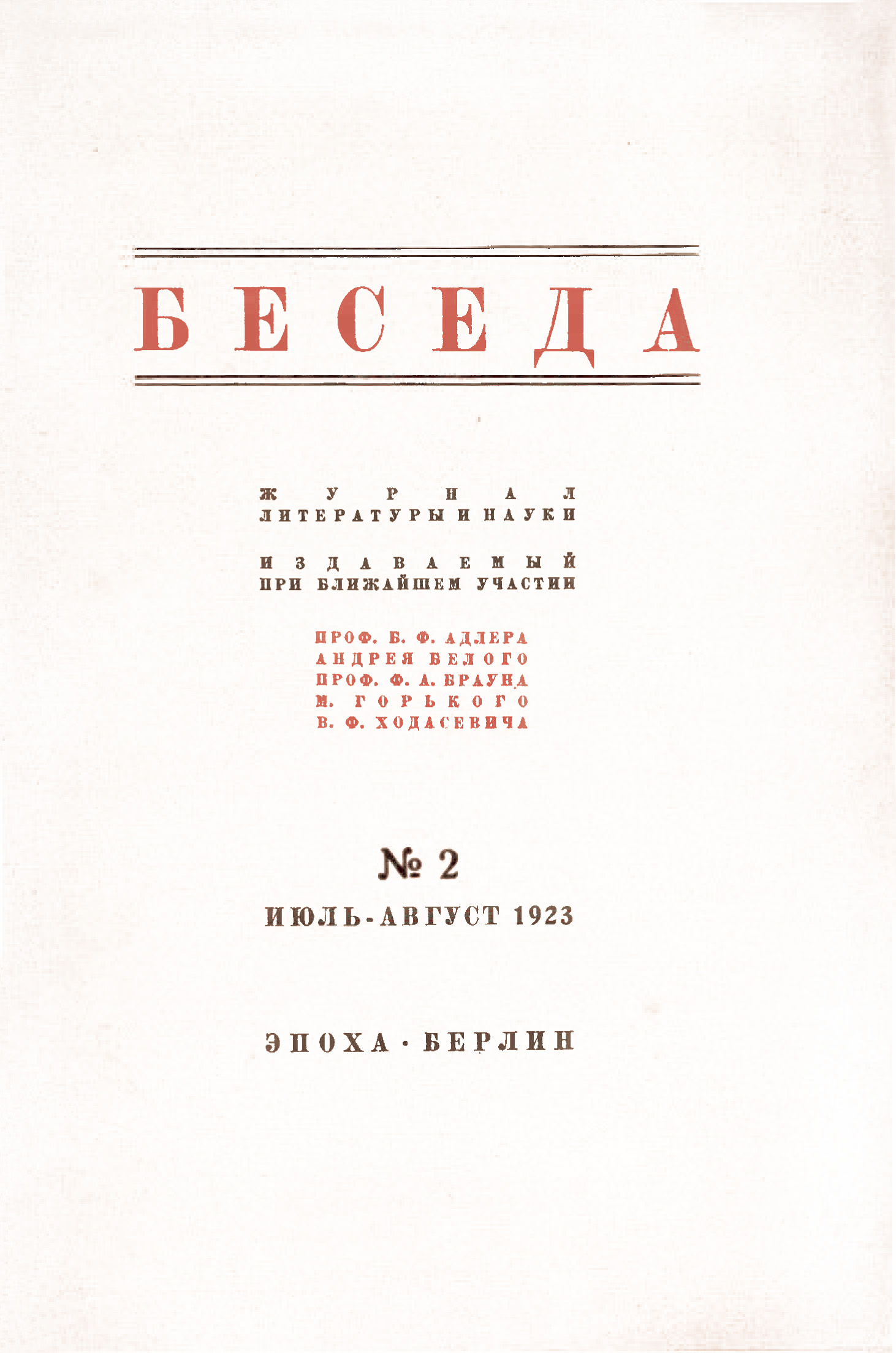 Журнал "Беседа" №2 июль-август 1923г.